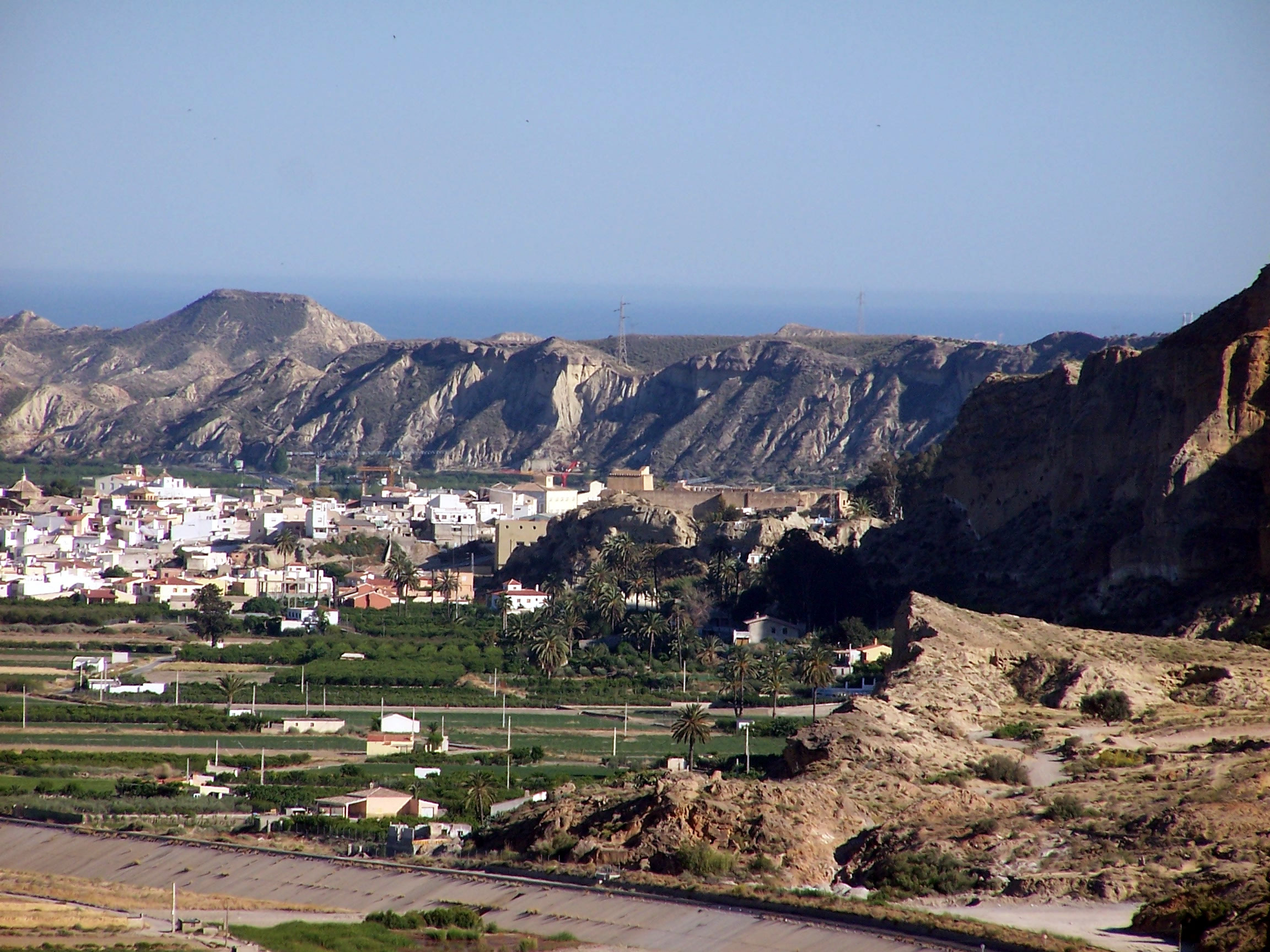 Cuevas del Almanzora. Vista desde la presa del embalse de Cuevas del Almanzora.